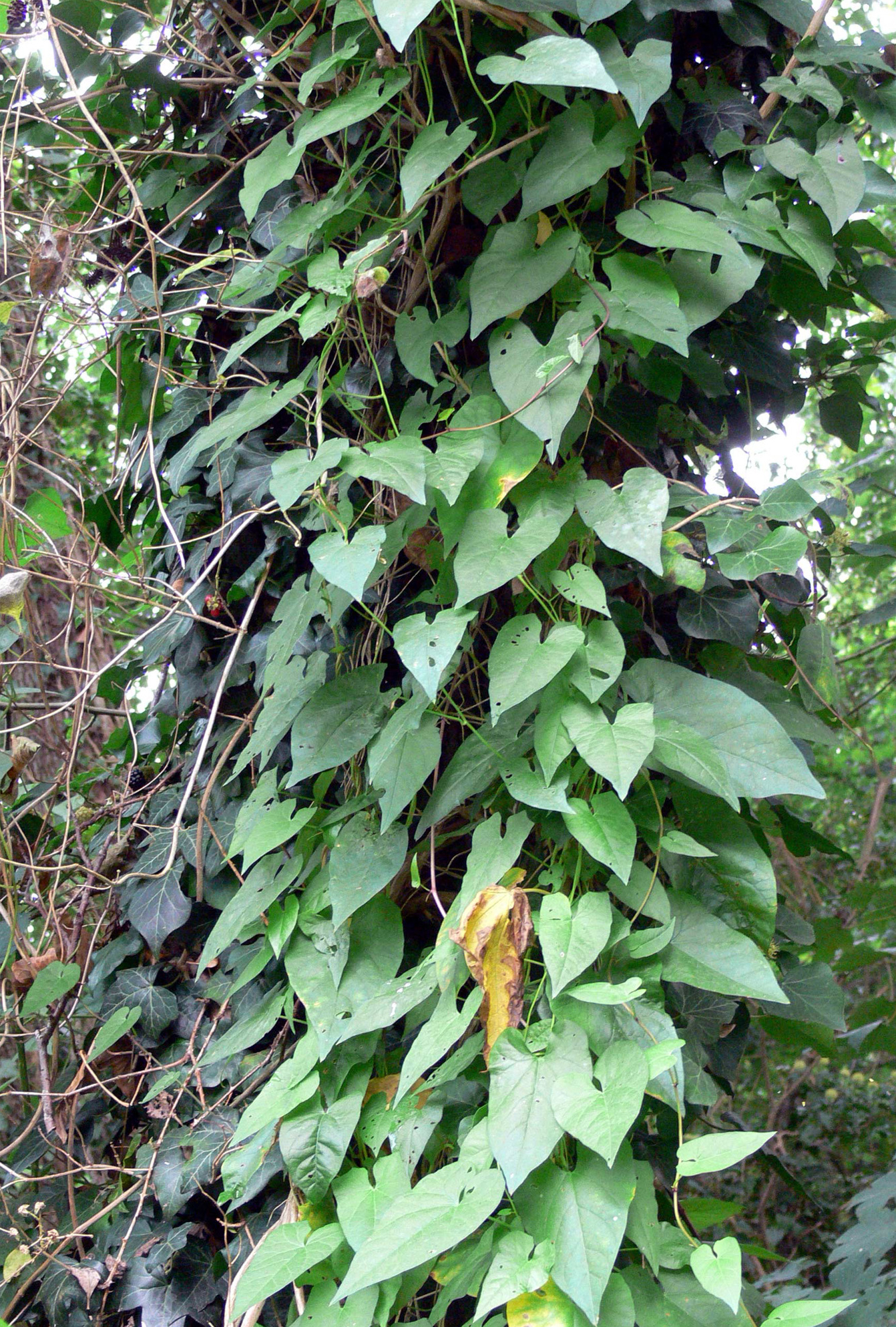 liseron sauvage et lierre.